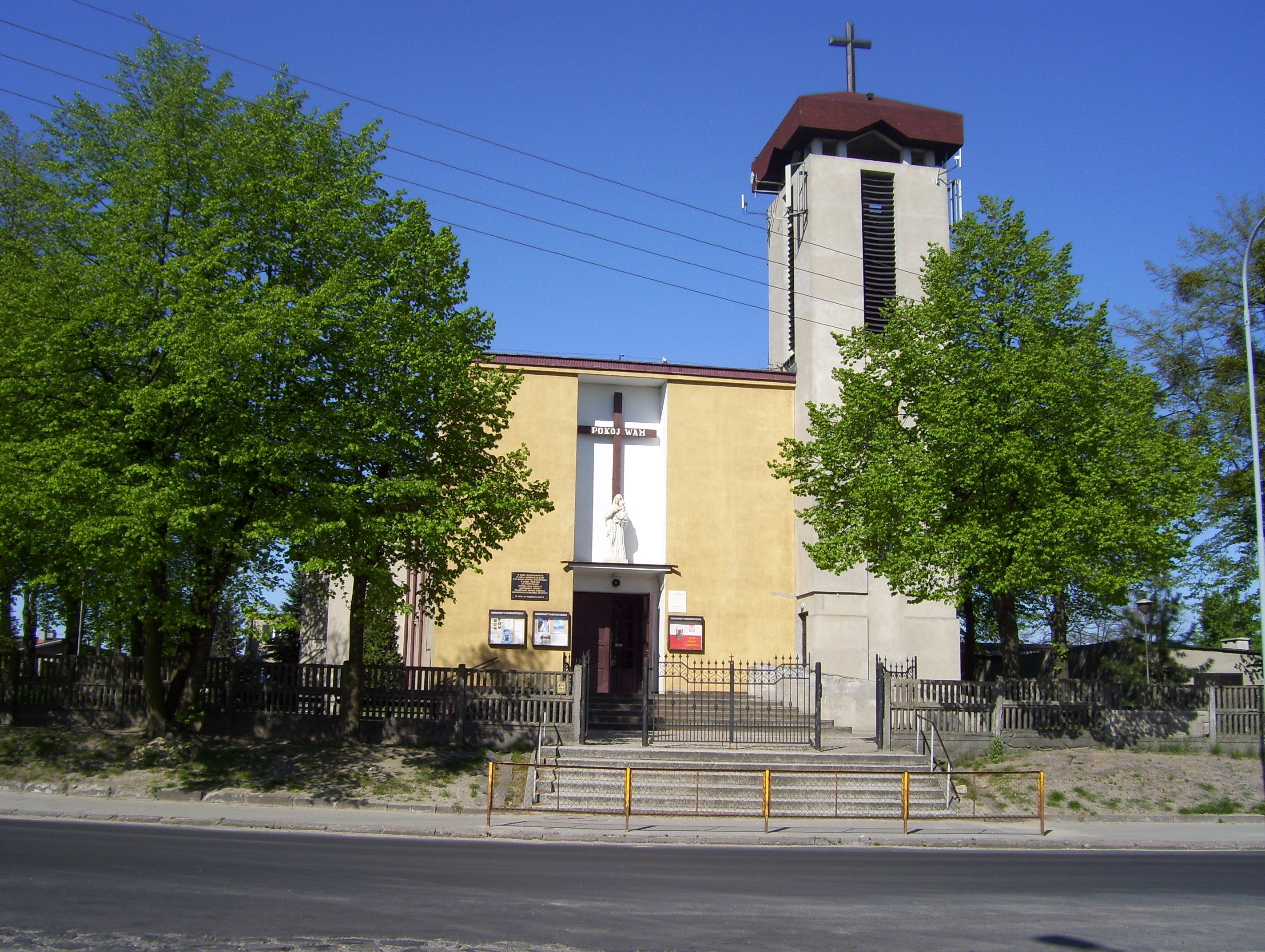 Kościół parafialny na Stokach.